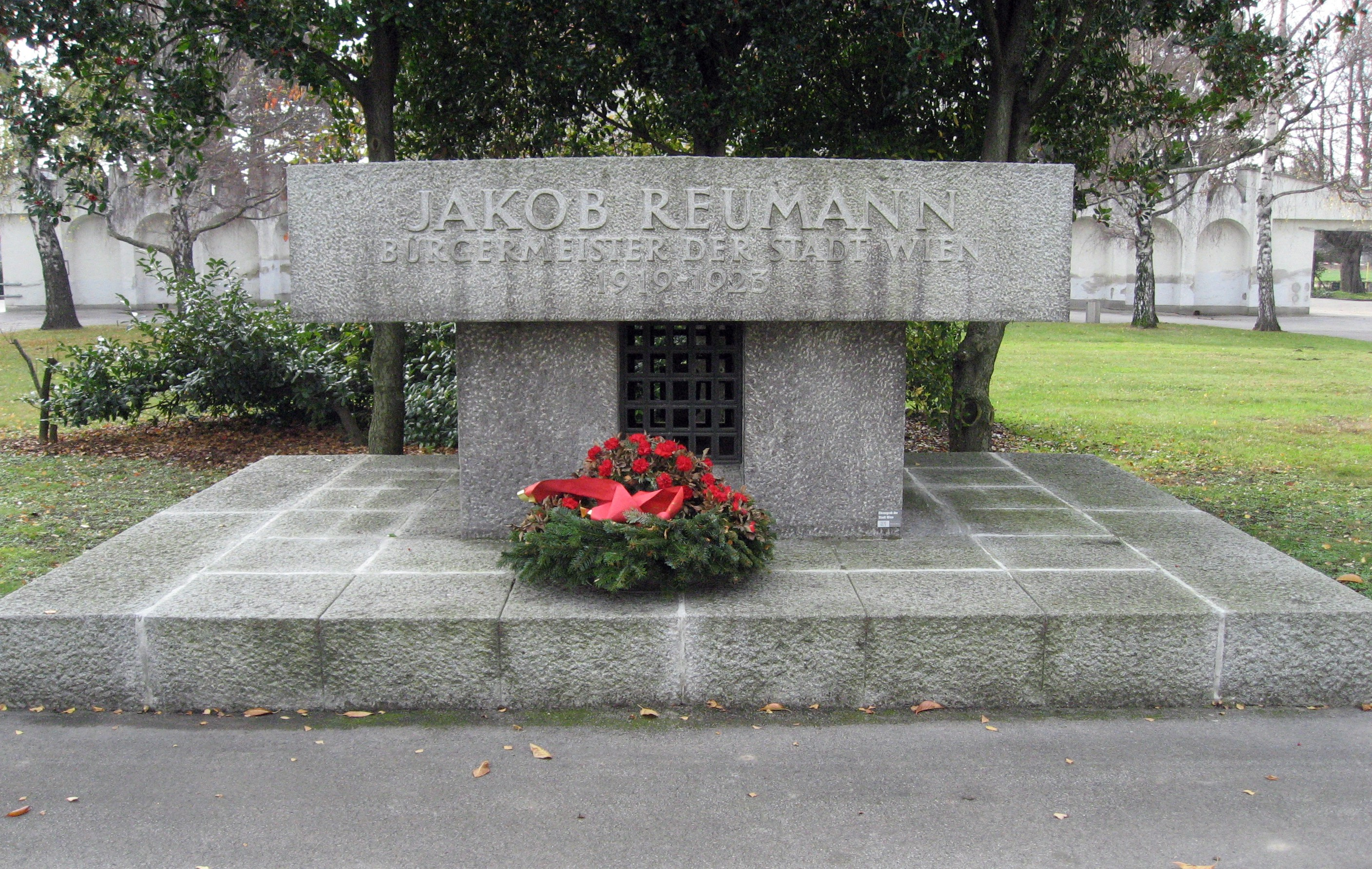 Wien, Feuerhalle Simmering, Urnengrabstelle Jakob Reumann